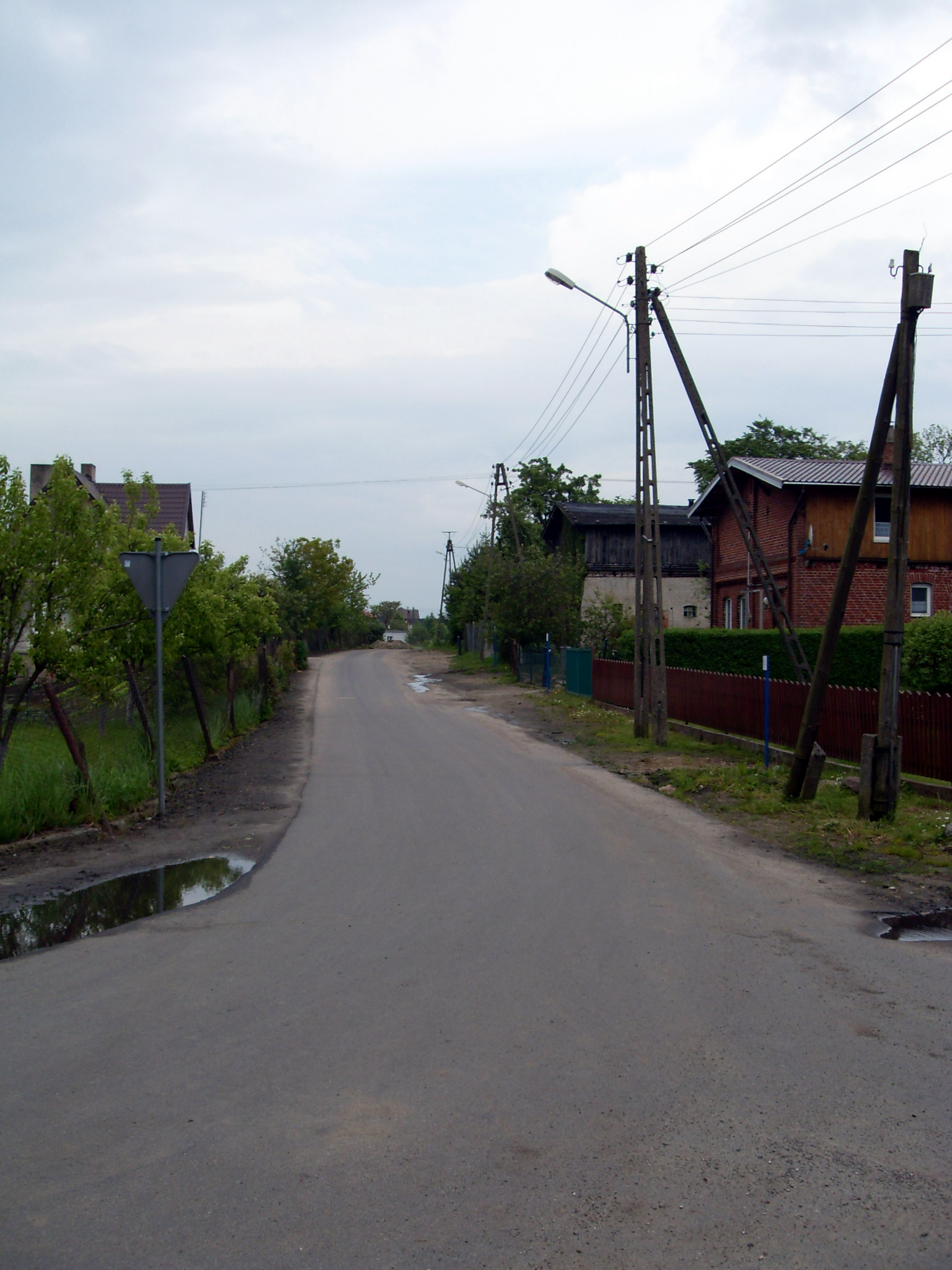 Czernin - droga przez wieś.